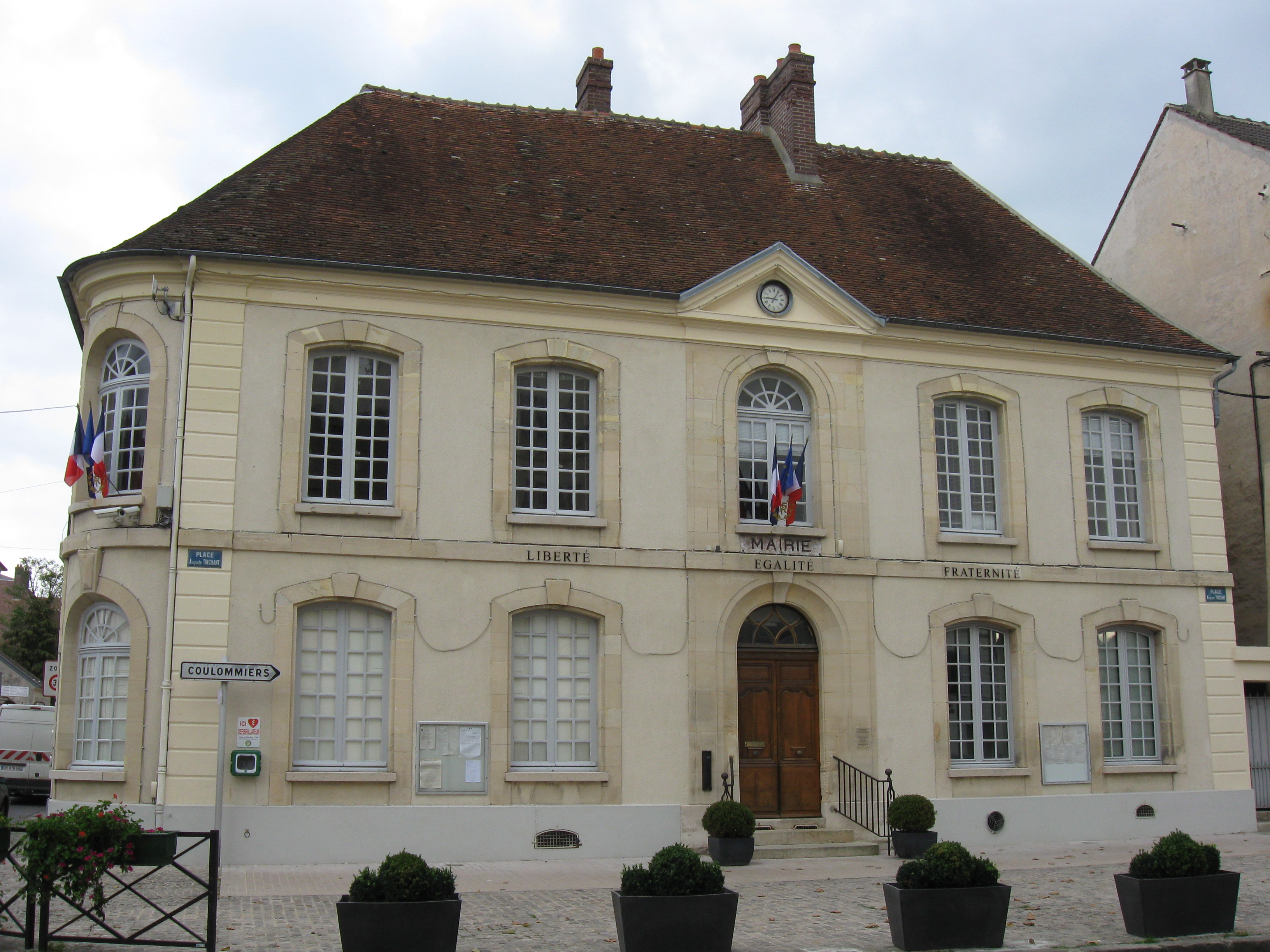 Mairie de Jouarre, ancien auditoire de l'abbaye Notre-Dame. (Seine-et-Marne, région Île-de-France).